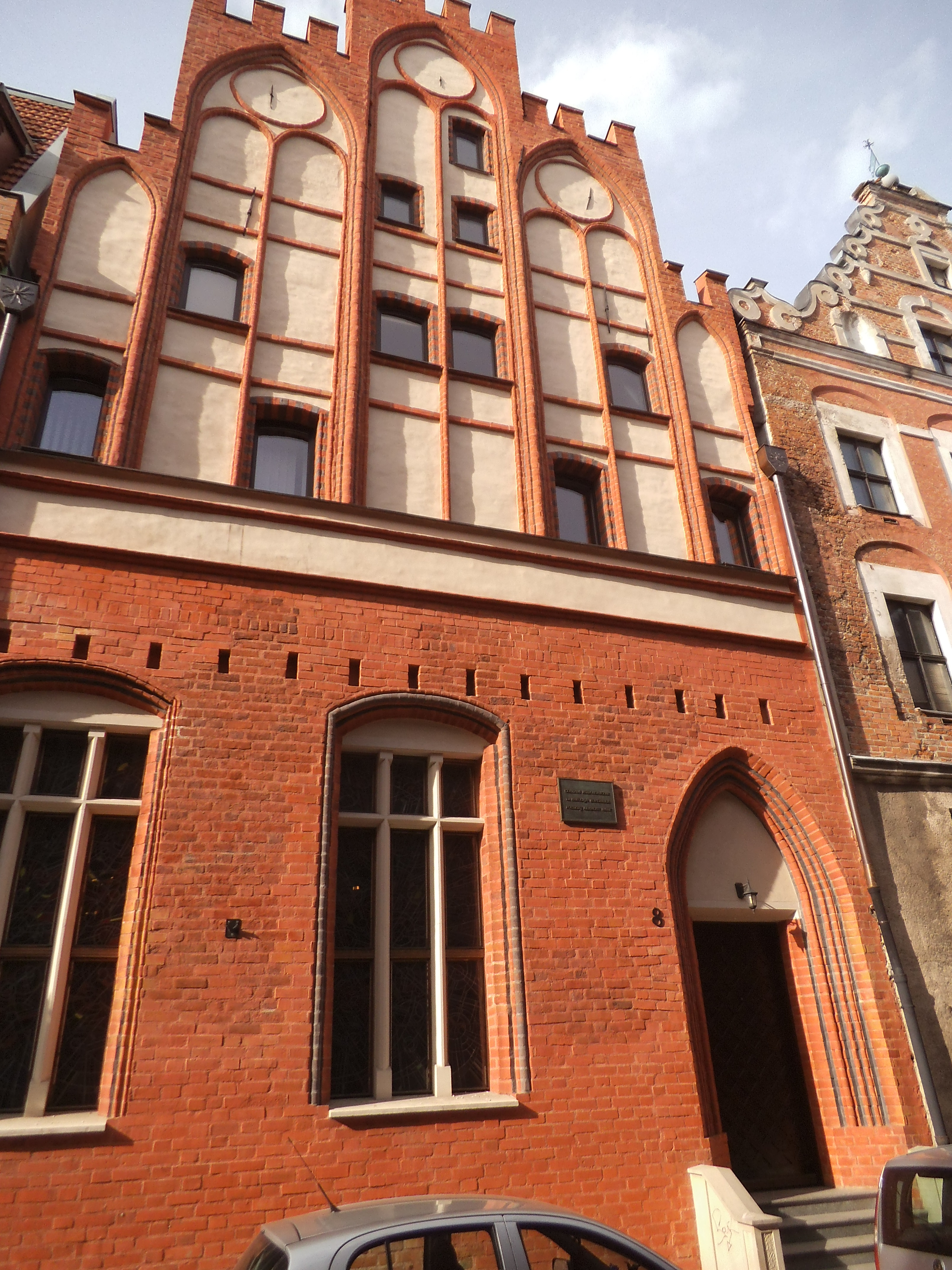 Zakład Astrofizyki Centrum Astronomicznego im. M. Kopernika